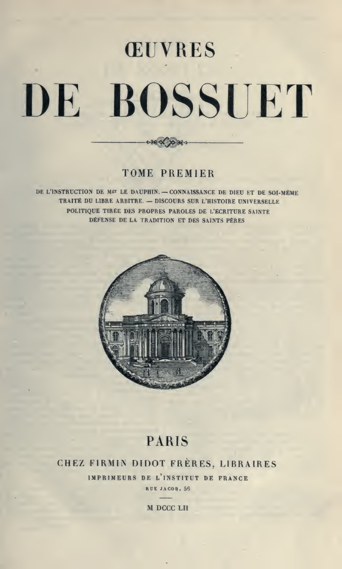 Oeuvres. 1 / de Bossuet. - Paris : chez Firmin Didot Freres, 1852. - XXIX, 787 p., [1] c. di tav. : 1 ritratto. Frontespizio